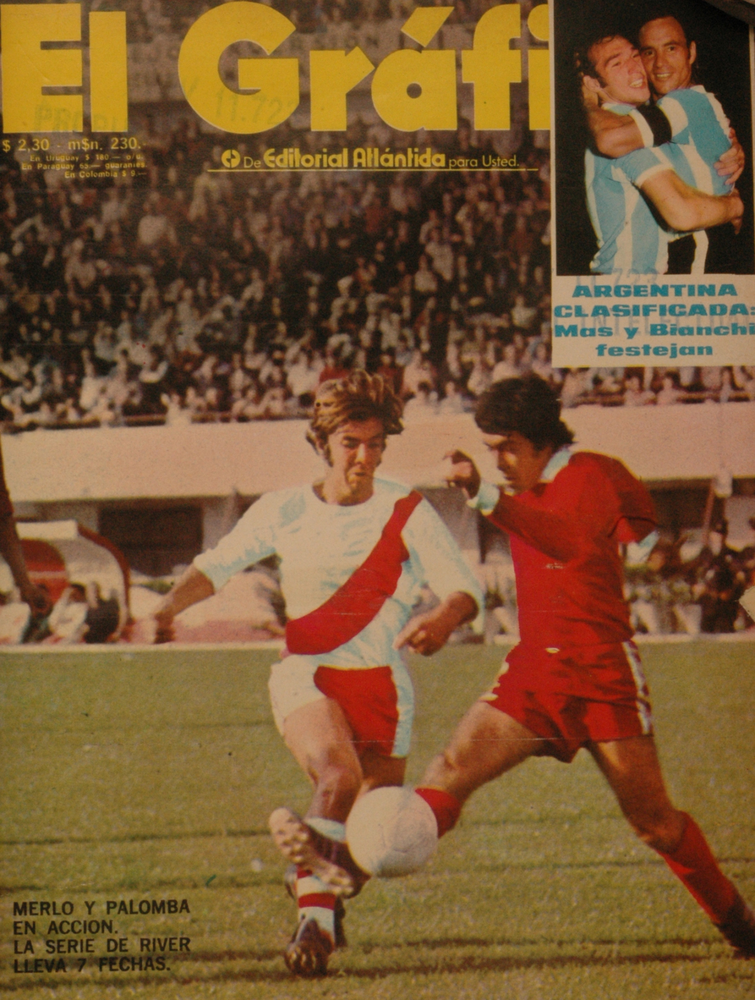 El Grafico del 27 de Junio de 1972. Edicion 2751